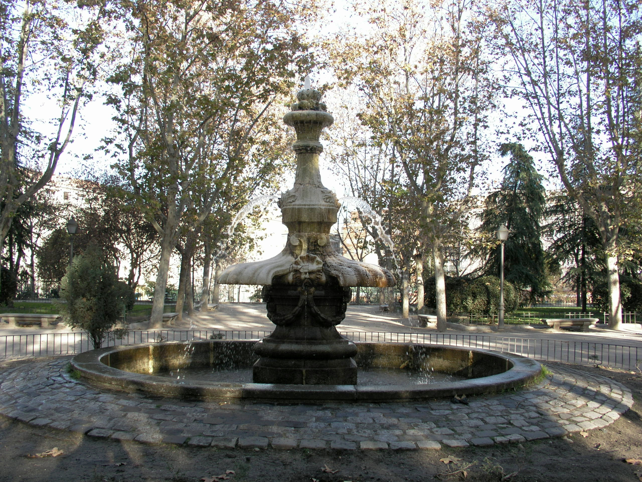 Parque de Maria Eva Duarte de Peron, Madrid, Spain. Water fountain.